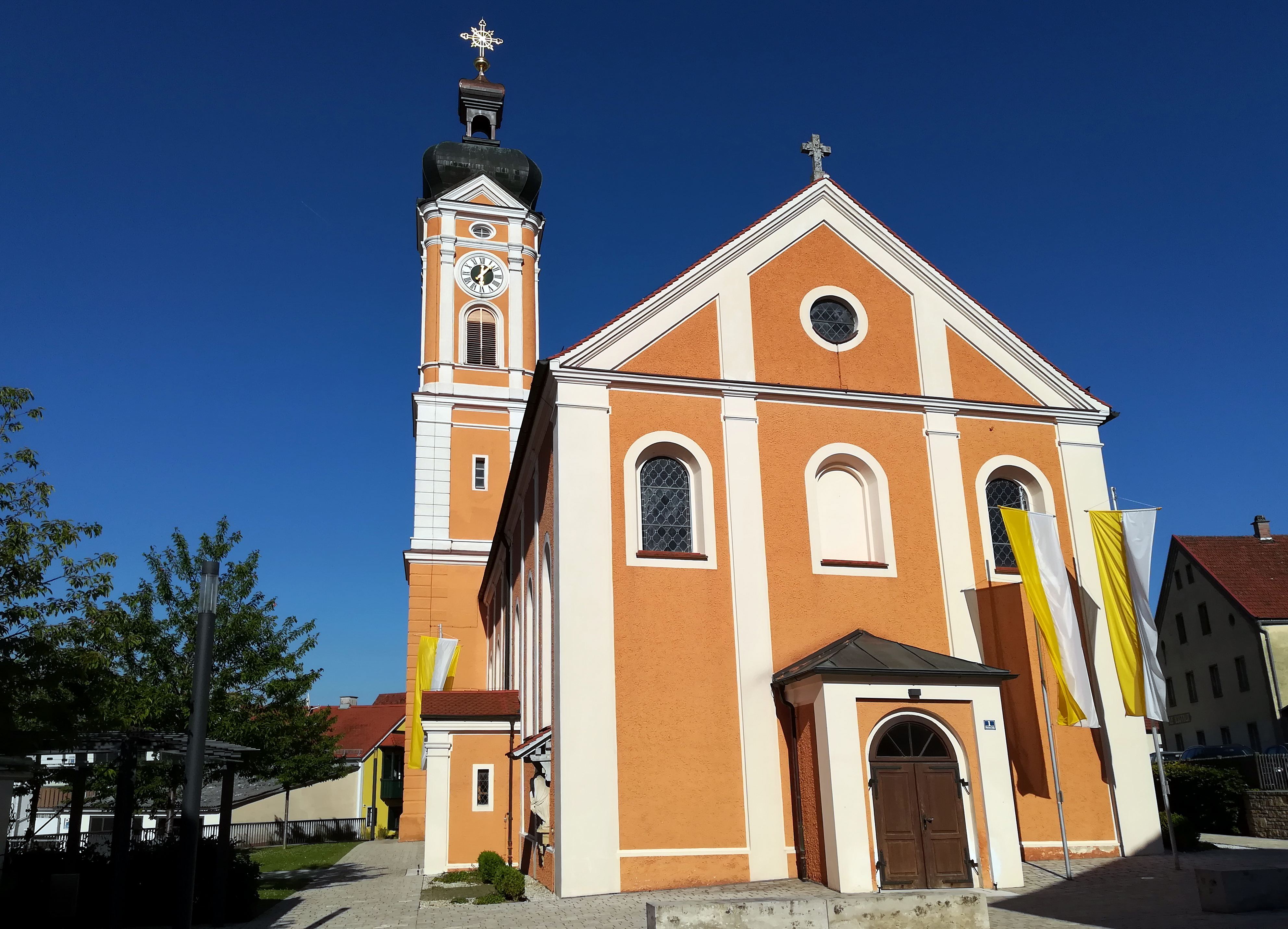 Katholische Pfarrkirche St. Georg